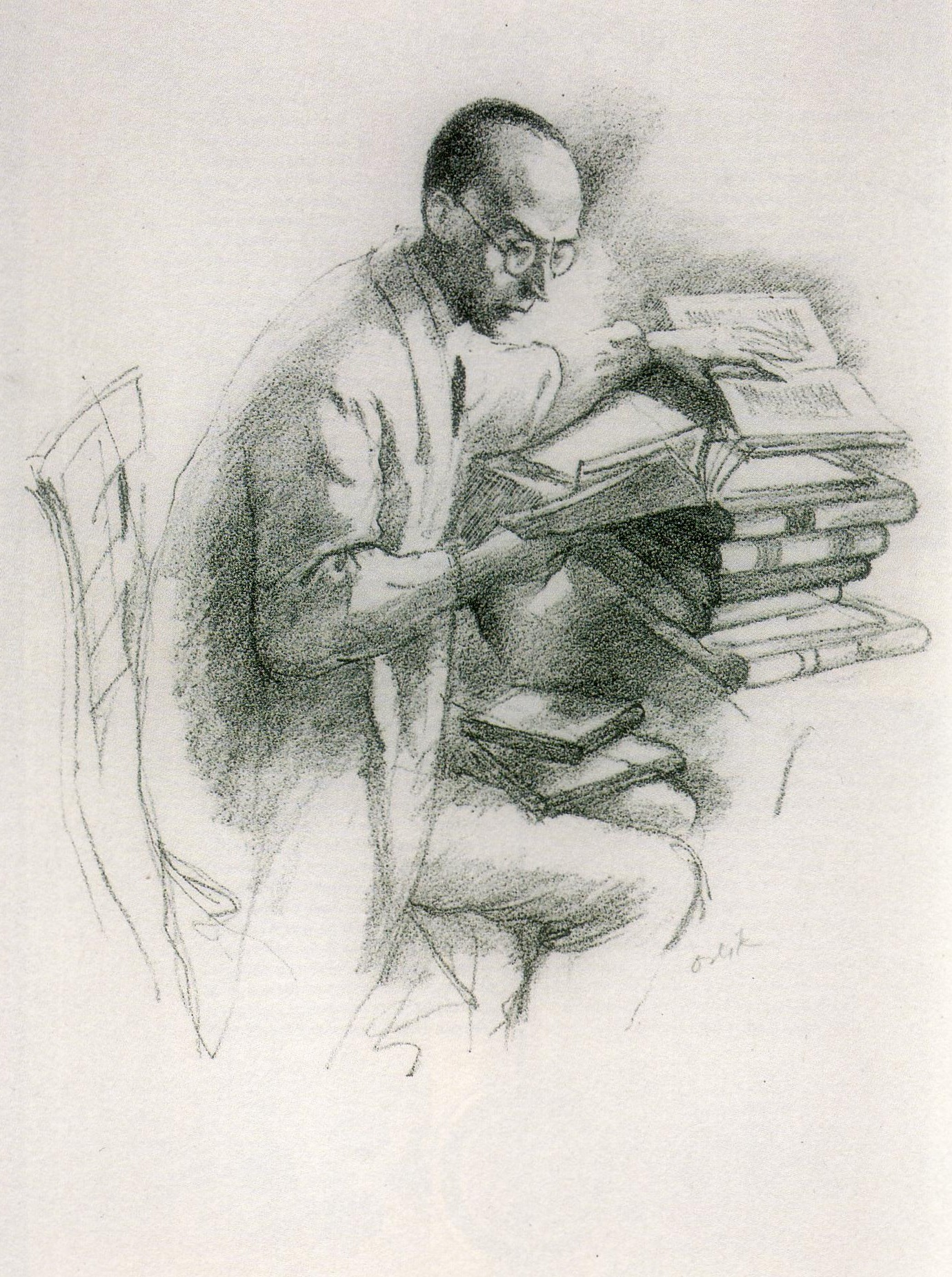 Emil Orlik (1870-1932): Der Dichter Klabund, Lithographie um 1915 - Public Domain